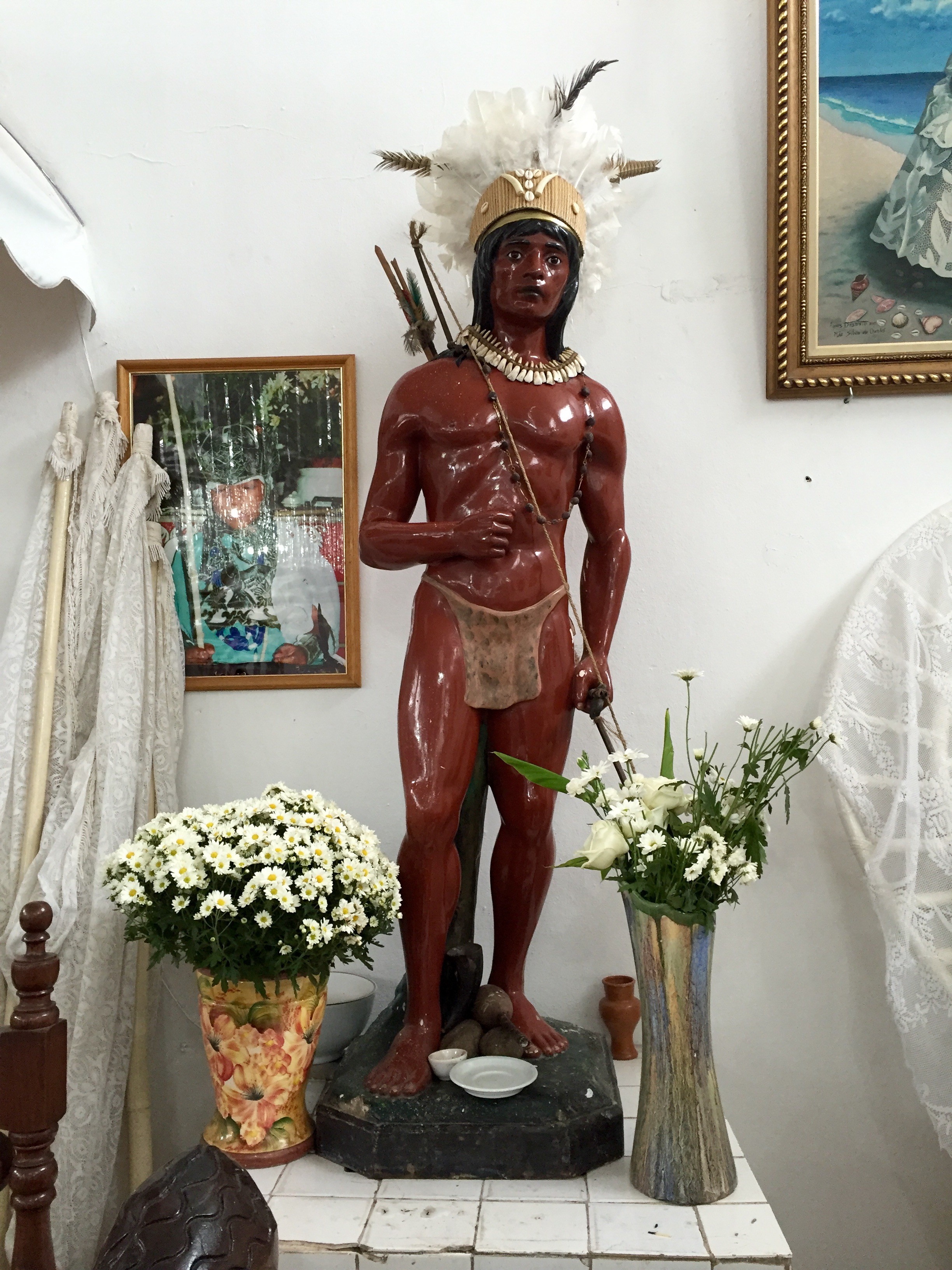 Estátua do índio caboclo no salão do Axé Ilê Obá, em São Paulo (SP), Brasil.